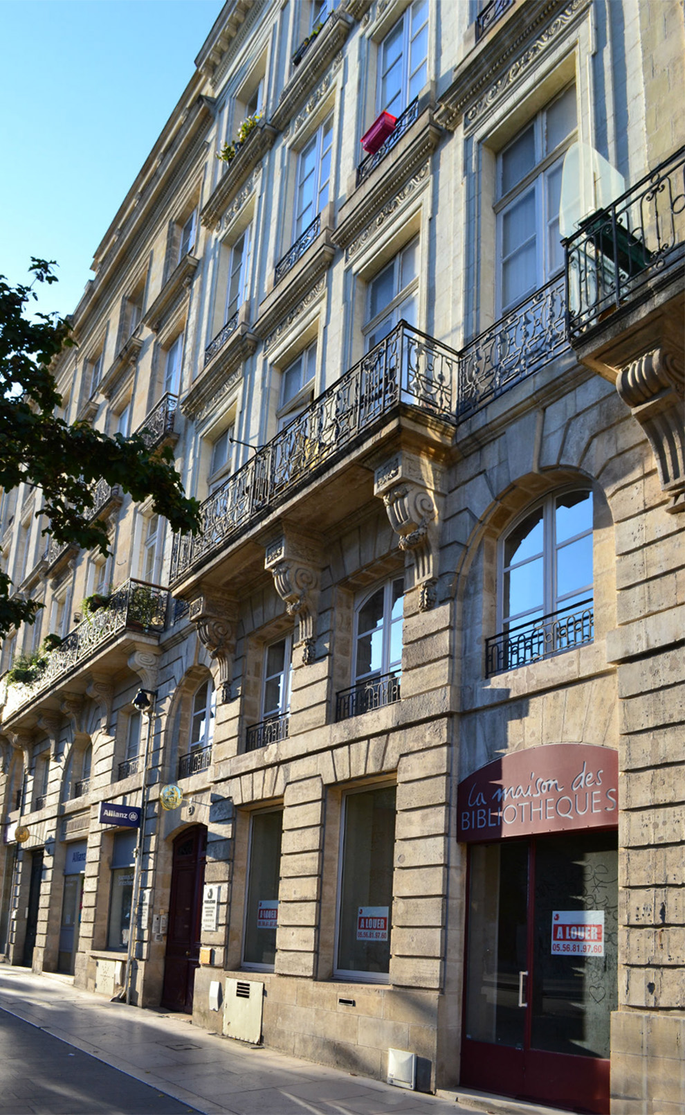 3 cours du Chapeau rouge - Bordeaux - Hotel Journu .